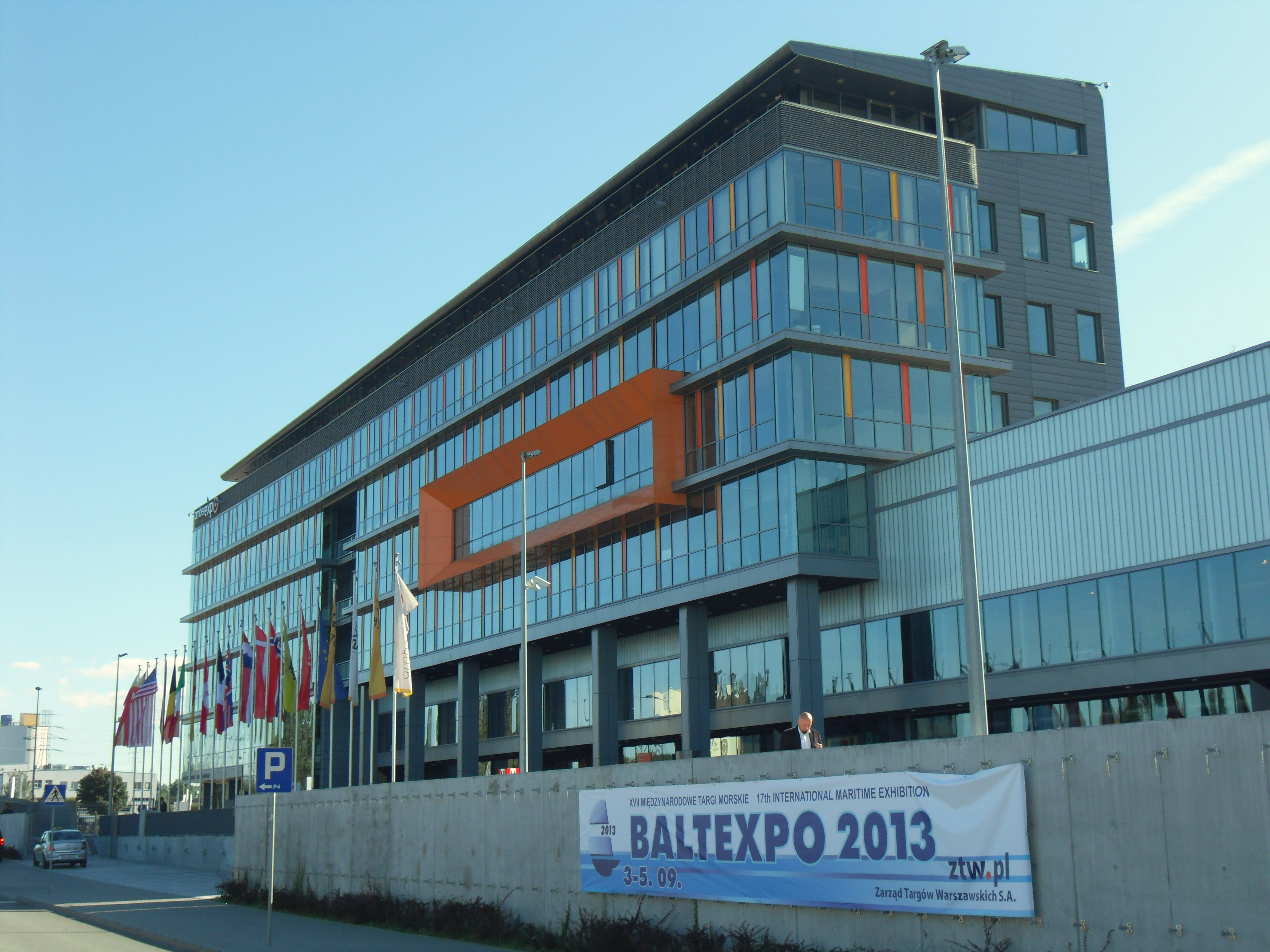 Centrum Wystawienniczo-Kongresowe AMBEREXPO. Gdańsk Letnica, ul. Żaglowa 11. Targi "Baltexpo" 2013.